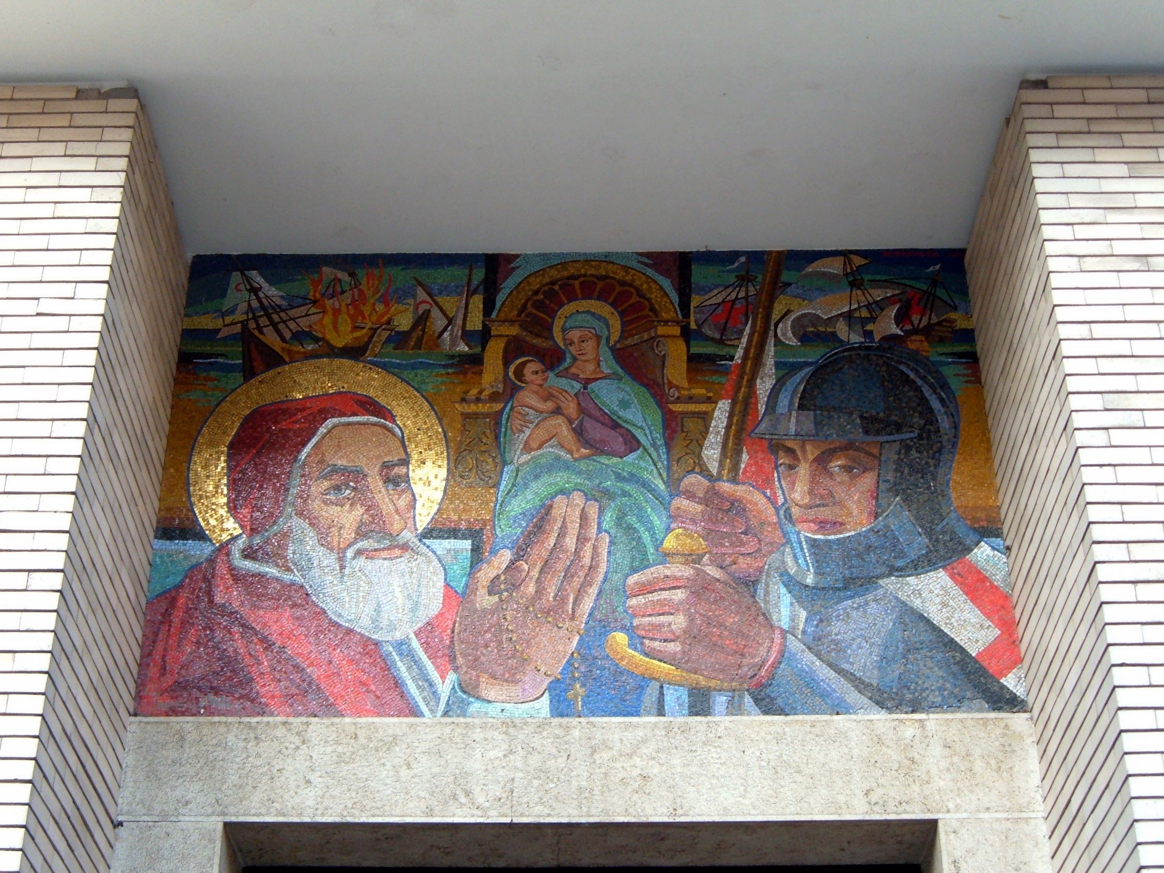 Chiesa di San Pio V, a Roma, nel quartiere Aurelio. Mosaico sul portale d'ingresso.